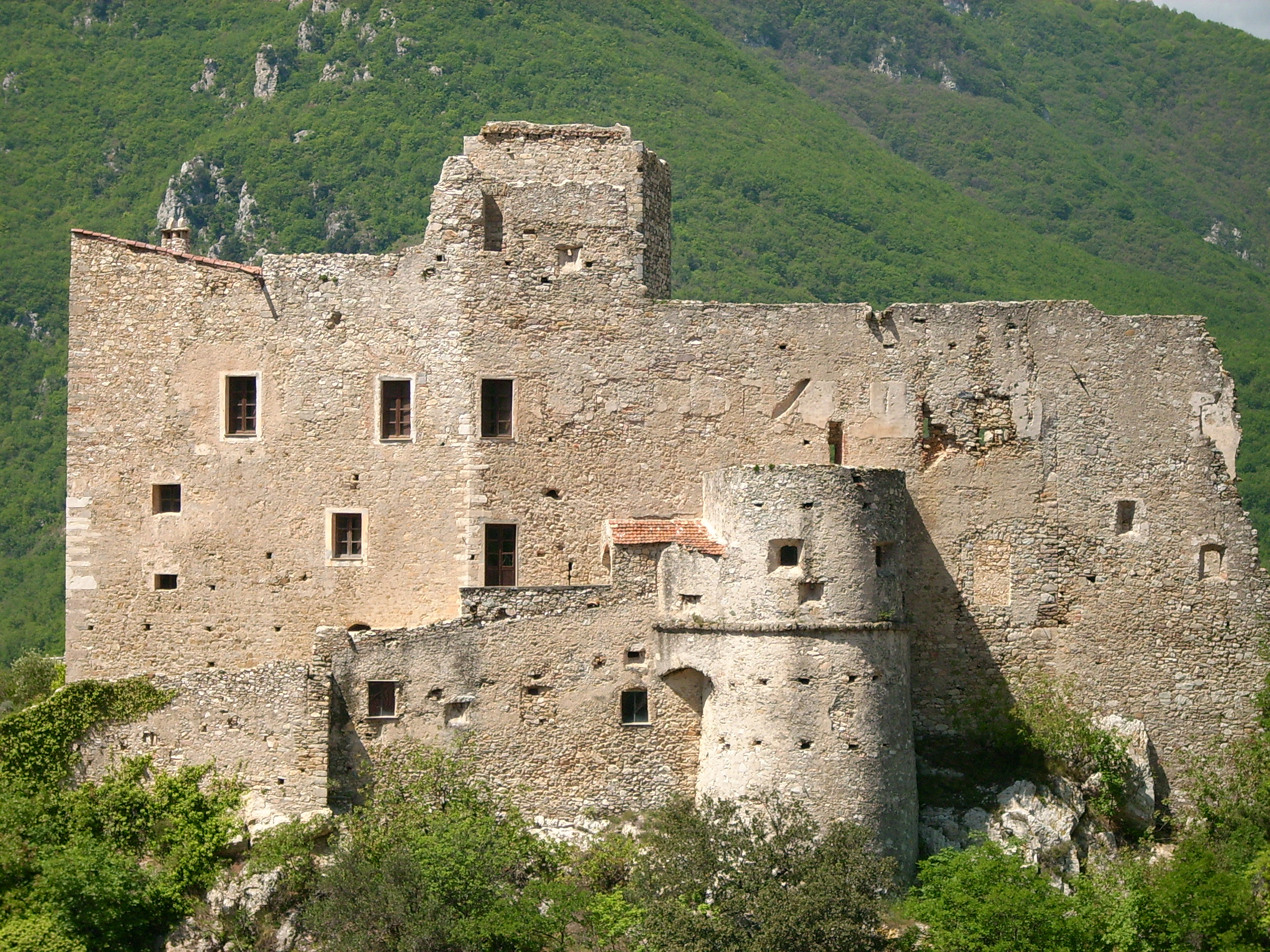 Castello di Castelvecchio di Rocca Barbena, Liguria, Italia